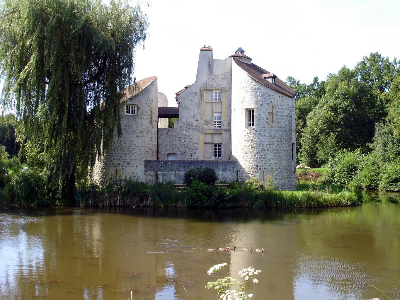 Le château de la Chasse en forêt de Montmorency (Val-d'Oise), France Juillet 2007 Photo personnelle (own work) de Clicsouris